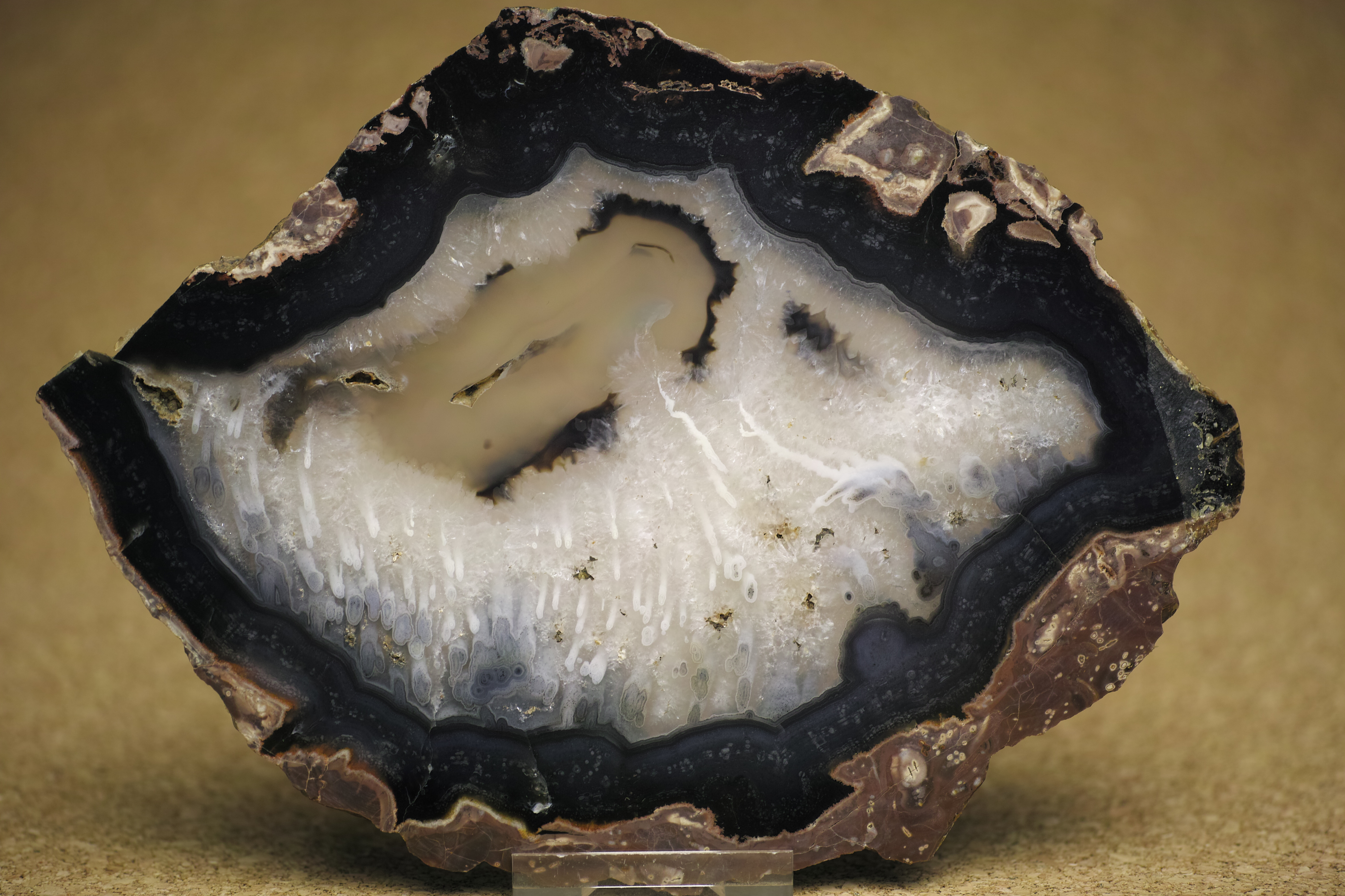 Thunderegg with Tube inclusions from Warm Springs, Madras, Oregon, U.S.A.